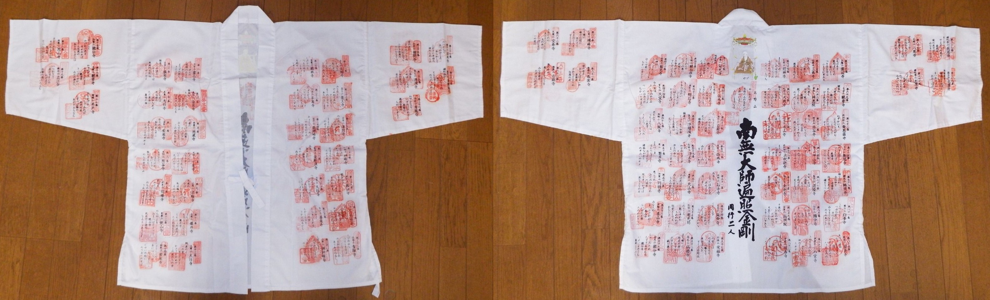 四国八十八箇所に白衣の御朱印